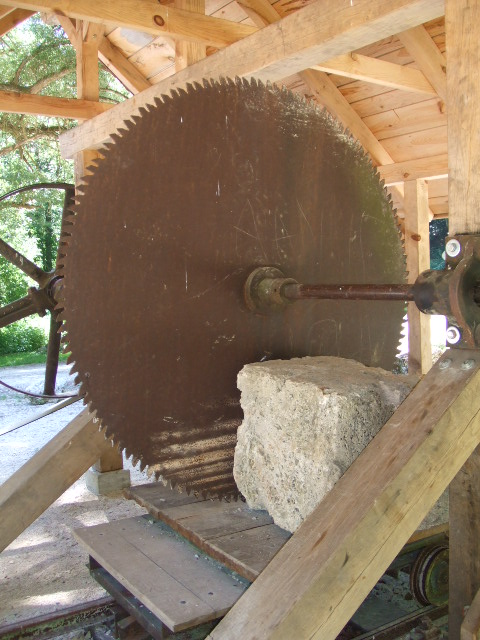 Laufenmühle, Gemeinde Lauterach, Alb-Donau-Kreis In der Nähe der Laufenmühle und beim Parkplatz am Beginn des Wolfstals ist in den letzten Jahren eine kleine Erinnerungsstätte für den einstigen Tuffstein-Abbau im Lautertal angelegt worden, von der Freiwilligen Feuerwehr Lauterach. Zu diesem Freilicht-Museum gehört die (einst) elektrisch betriebene Tuff-Sägemaschine. Sie wurde zwischen den Weltkriegen eigens für den Tuffstein-(genauer: Kalksinter-)Abbau im Lautertal entworfen.